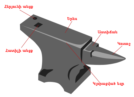 զնդան, գործիք, դարբին, anvil